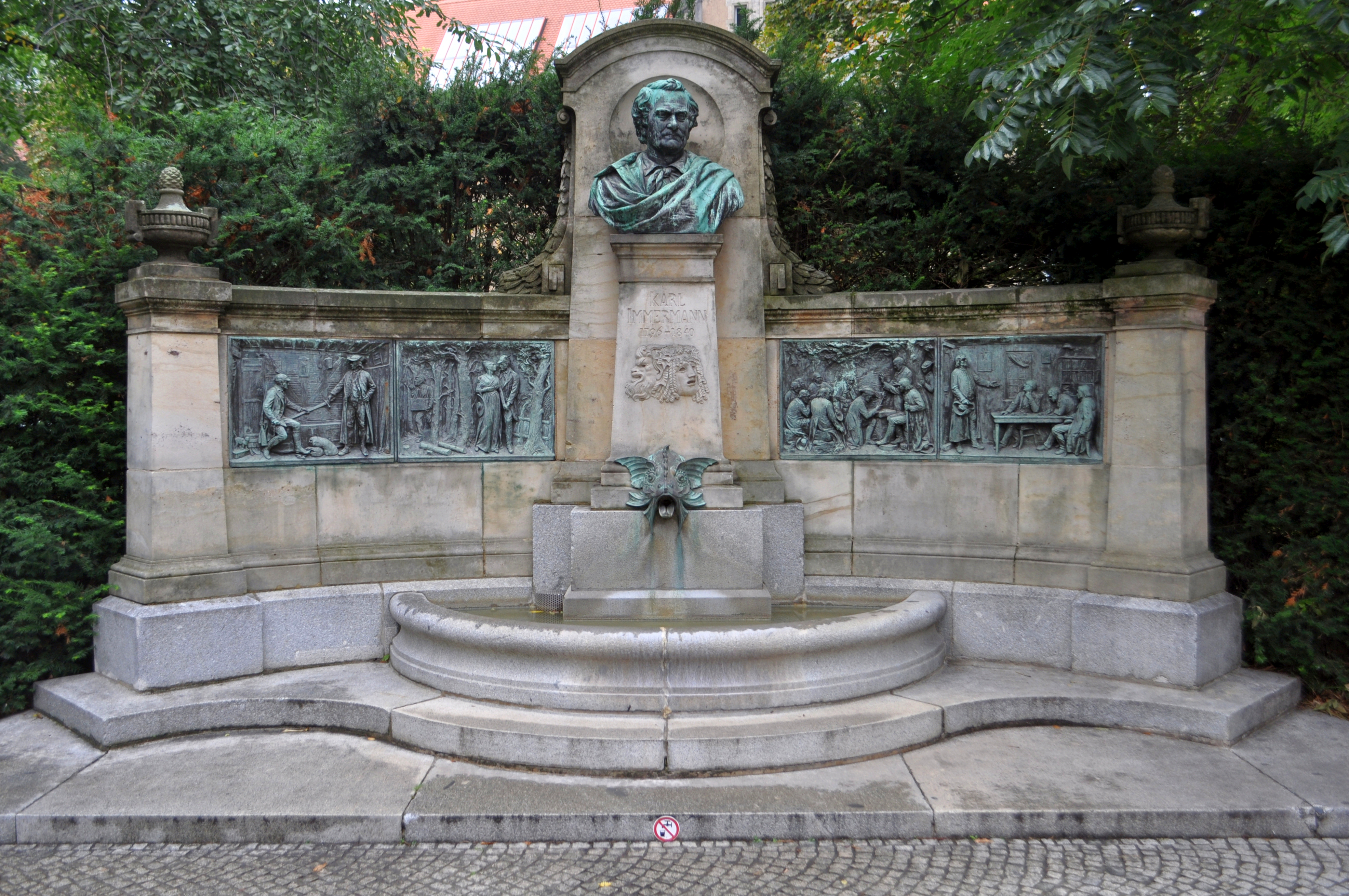 Der Immermannbrunnen in Magdeburg-Altstadt. This is a photograph of an architectural monument.It is on the list of cultural monuments of Magdeburg